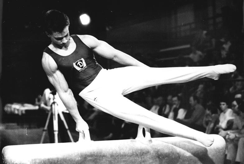 Andreas Wecker ADN-ZB Oberst 1.4.89 Bez. Potsdam: DTV-Pokal im Turnen der Männer in Falkensee-Mit dem Überraschungssieg des Berliners Andreas Wecker vom SC Dynamo endeten die Turnwettbewerbe um den DTV-Pokal der Männer. Der Olympia-Achte am Reck, vor dem letzten Gerät nur an vierter Stelle liegend, riß den Erfolg mit einer glanzvollen Darbietung an seinem Spezialgerät noch aus dem Feuer. Der Tageshöchstwert von 9,85 Punkten am Reck brachte ihm den Sieg.